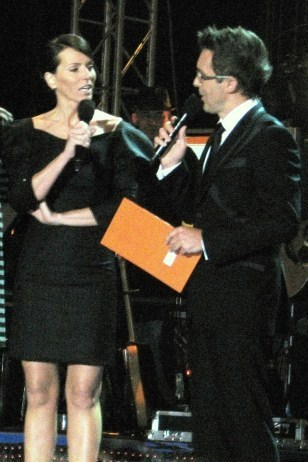 Koncert inaugurujący jesienną ramówkę TVP (Warszawa, ul. Woronicza), na scenie prowadzący Pytanie na śniadanie: Paulina Kurzajewska i Maciej Kurzajewski.